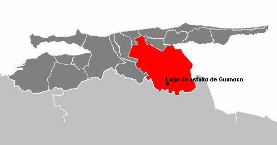 Localizacion del Lago de asfalto de Guanoco Description Municipality in Venezuela: Benitez-sucre.PNG DateNovember 2006SourceOwn workAuthorM.MinderhoudPermission(Reusing this file) Municipality in Venezuela: Benitez-sucre.PNG